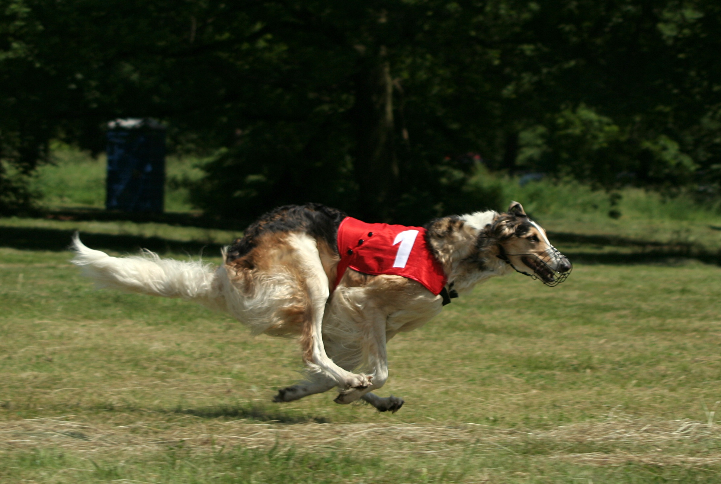 Wyścigi chartów w Świerklańcu - biegnący borzoj